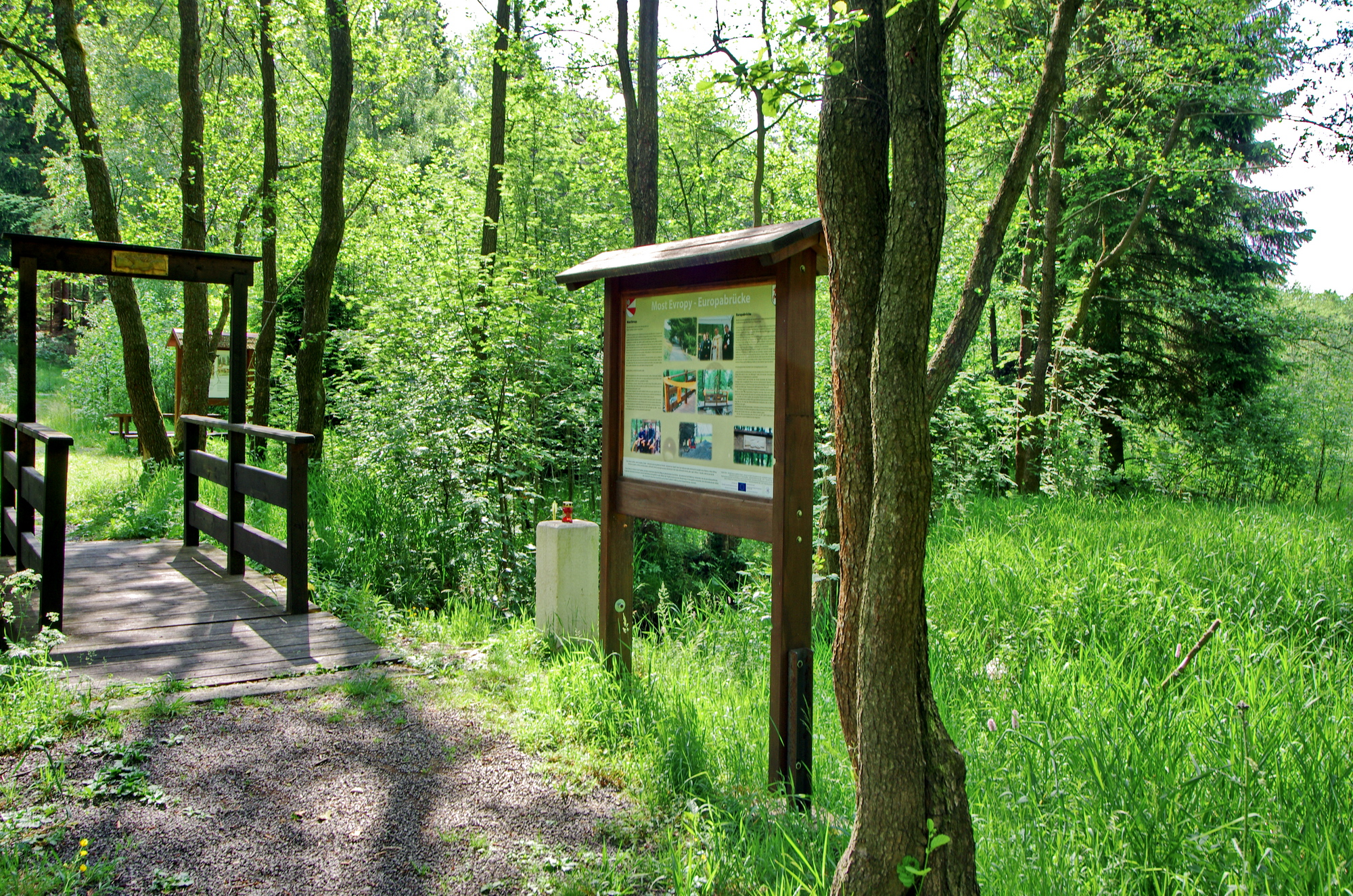 Most Evropy přes Újezdský potok u zaniklé osady Újezd, na česko-německé hranici u Aše, okres Cheb